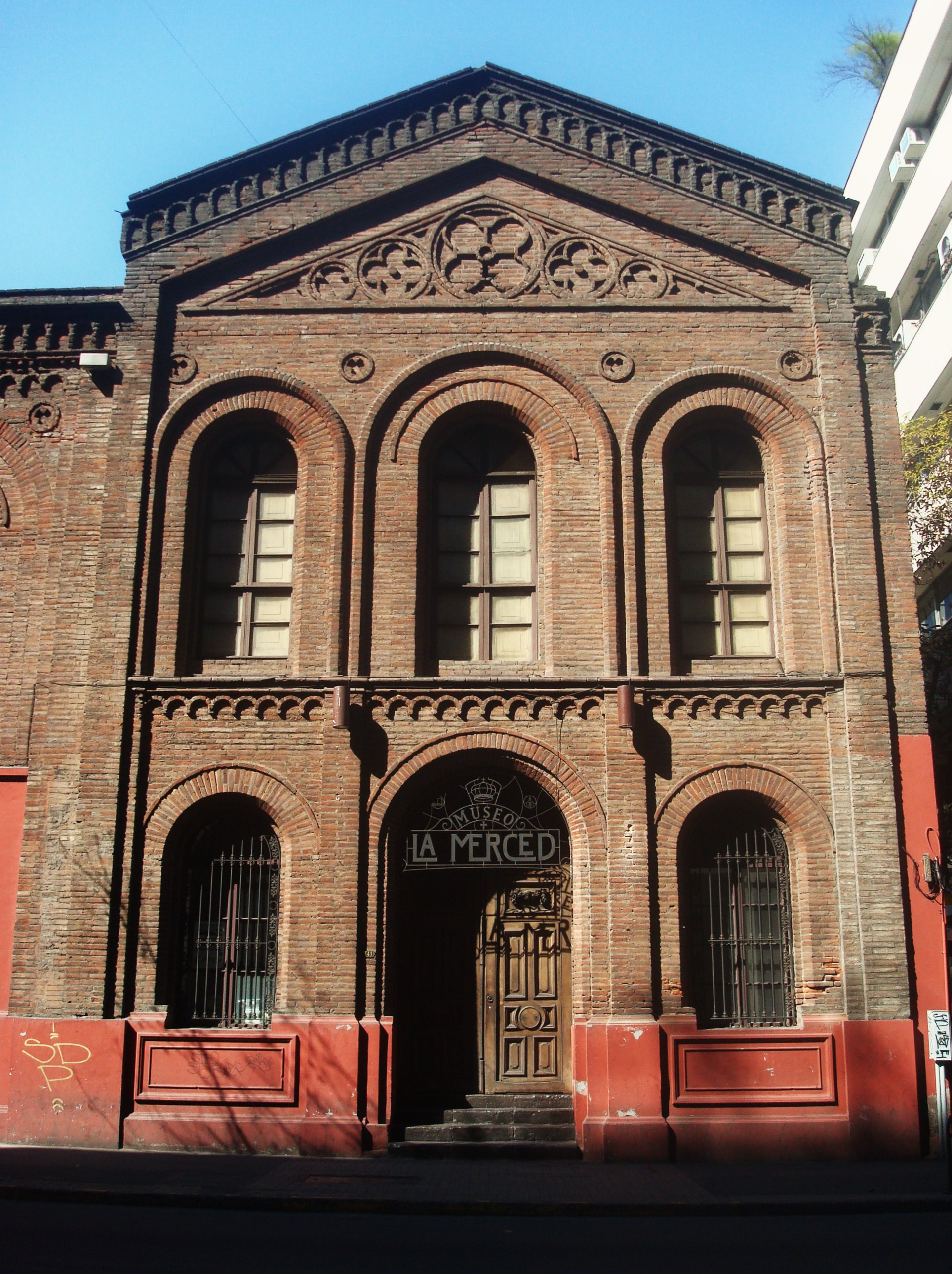 Museo La Merced, Santiago Centro, Chile